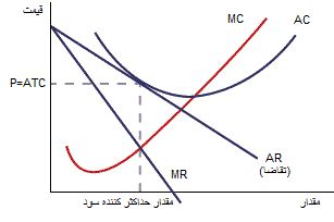 بنگاه رقابت انحصاري در بلندمدت. در بازار رقابت انحصاري، با وجود سود انحصاري بنگاه هاي جديد به بازار وارد مي شوند و منحني هاي تقاضاي بنگاه هايي که از قبل در بازار حضور داشته اند به سمت چپ انتقال مي يابد. به طور مشابه اگر بنگاه ها در بازار رقابت انحصاري ضرر کنند از بازار خارج مي شوند و منحني تقاضاي بنگاه هاي باقيمانده در بازار به سمت راست انتقال مي يابد. به دليل همين جابه جايي ها در منحني هاي تقاضا نهايتاً يک بنگاه در بازار رقابت انحصاري به تعادل بلندمدت مي رسد (همان طور که در نمودار نشان داده ايم). در تعادل بلند مدت قيمت و هزينه ی متوسط کل برابر شده و سود بنگاه به صفر مي رسد.